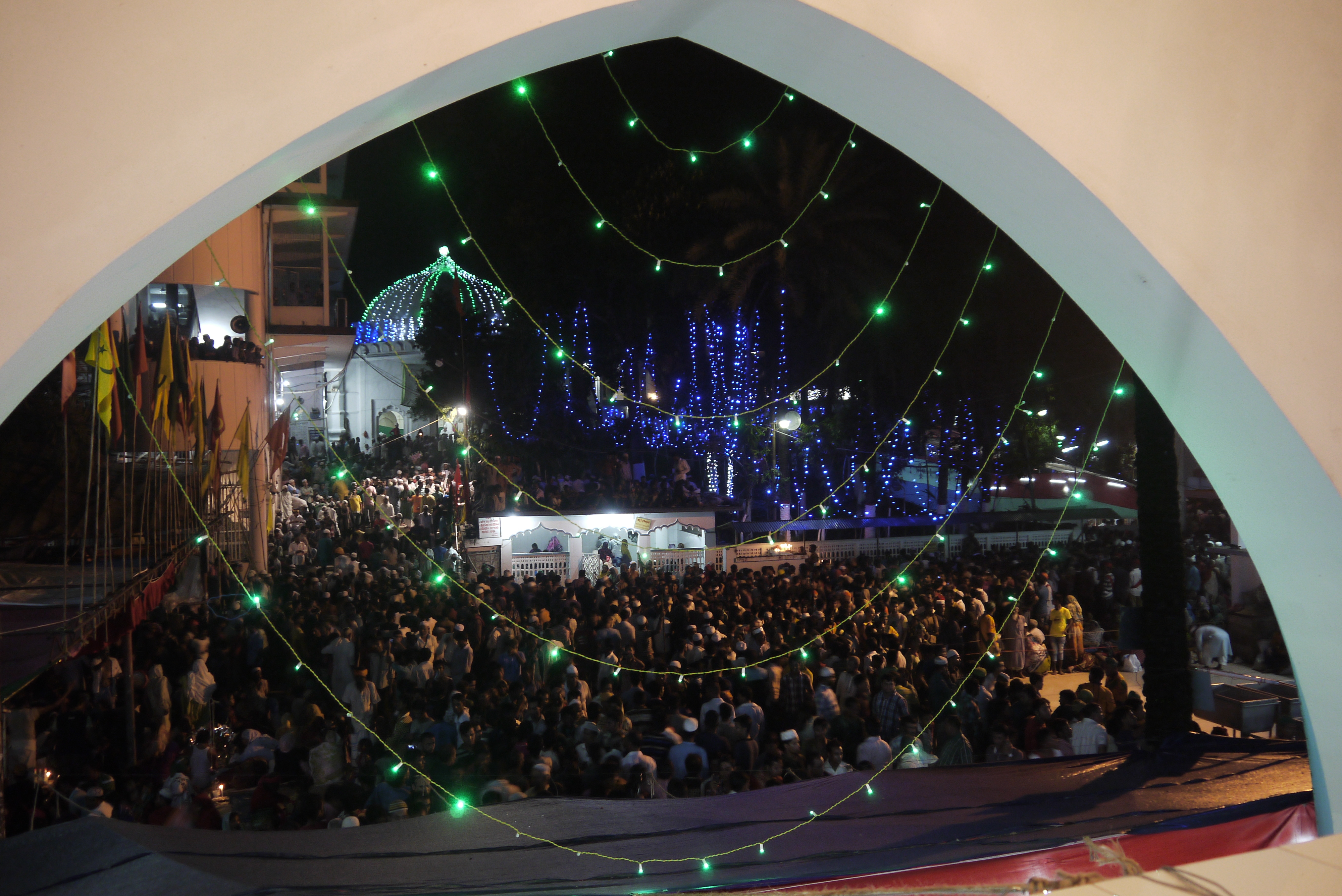 হযরত শাহজালালের দরগাহ